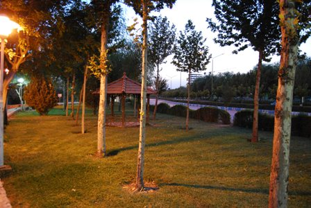 گرفته شده توسط شهرداری محترم /بارگذاری ع.الف